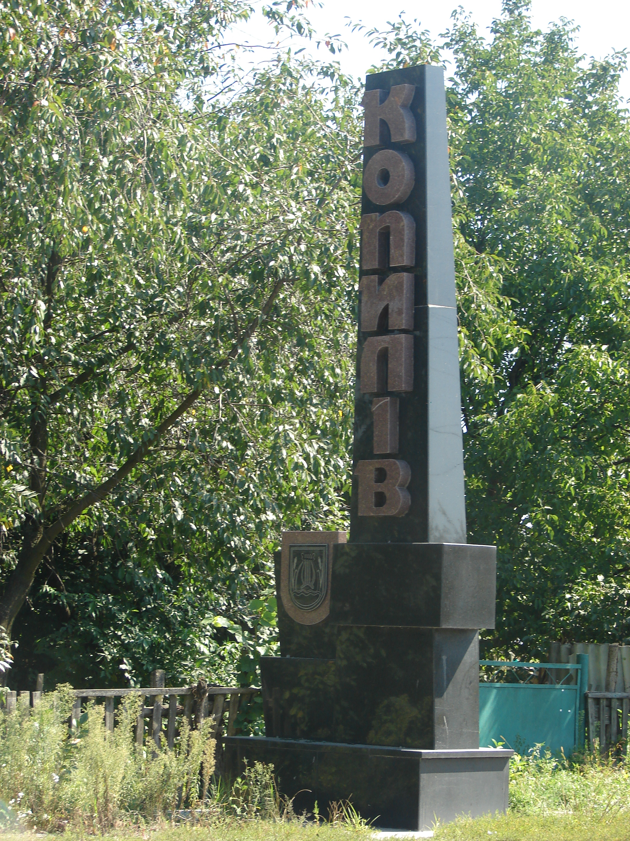 Копилів. В'їзд до села